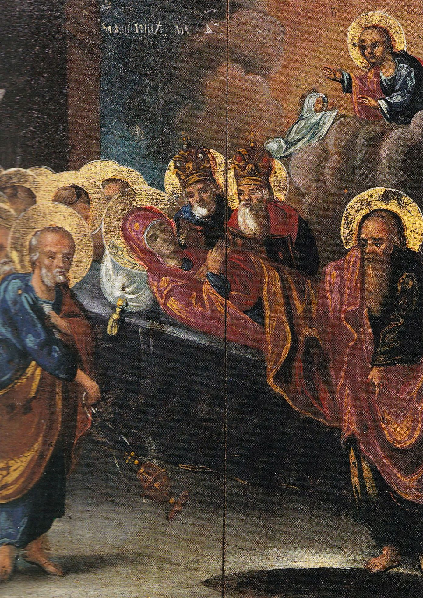 Nicolae Grigorescu - Icoana Moartea Fecioarei Maria din biserica de la Băicoi